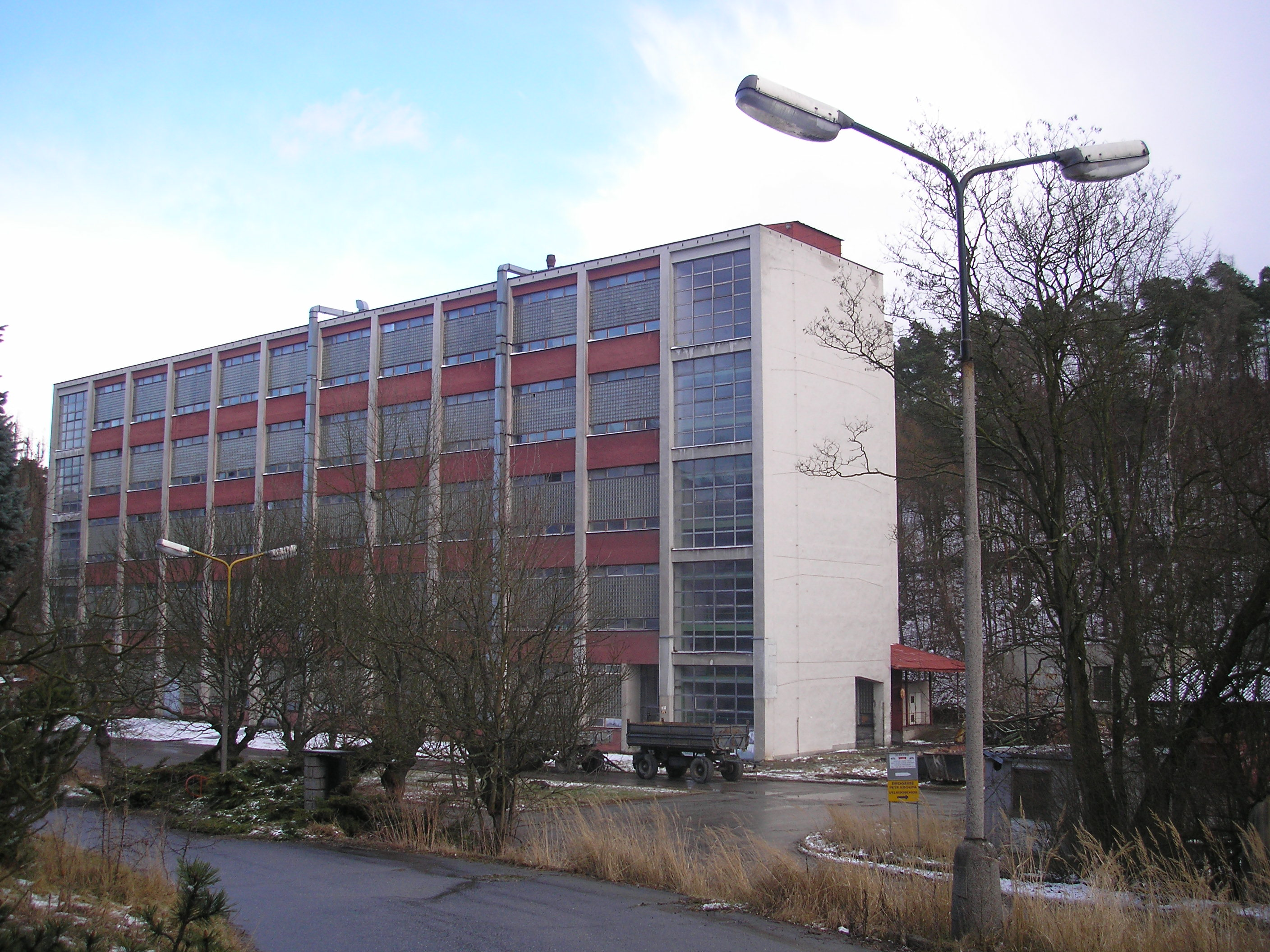 Jedna z budov v areálu bývalé společnosti BOPO.